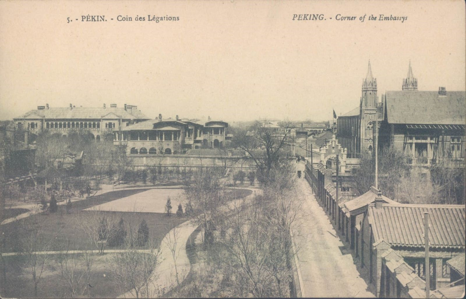 北京东交民巷使馆区明信片